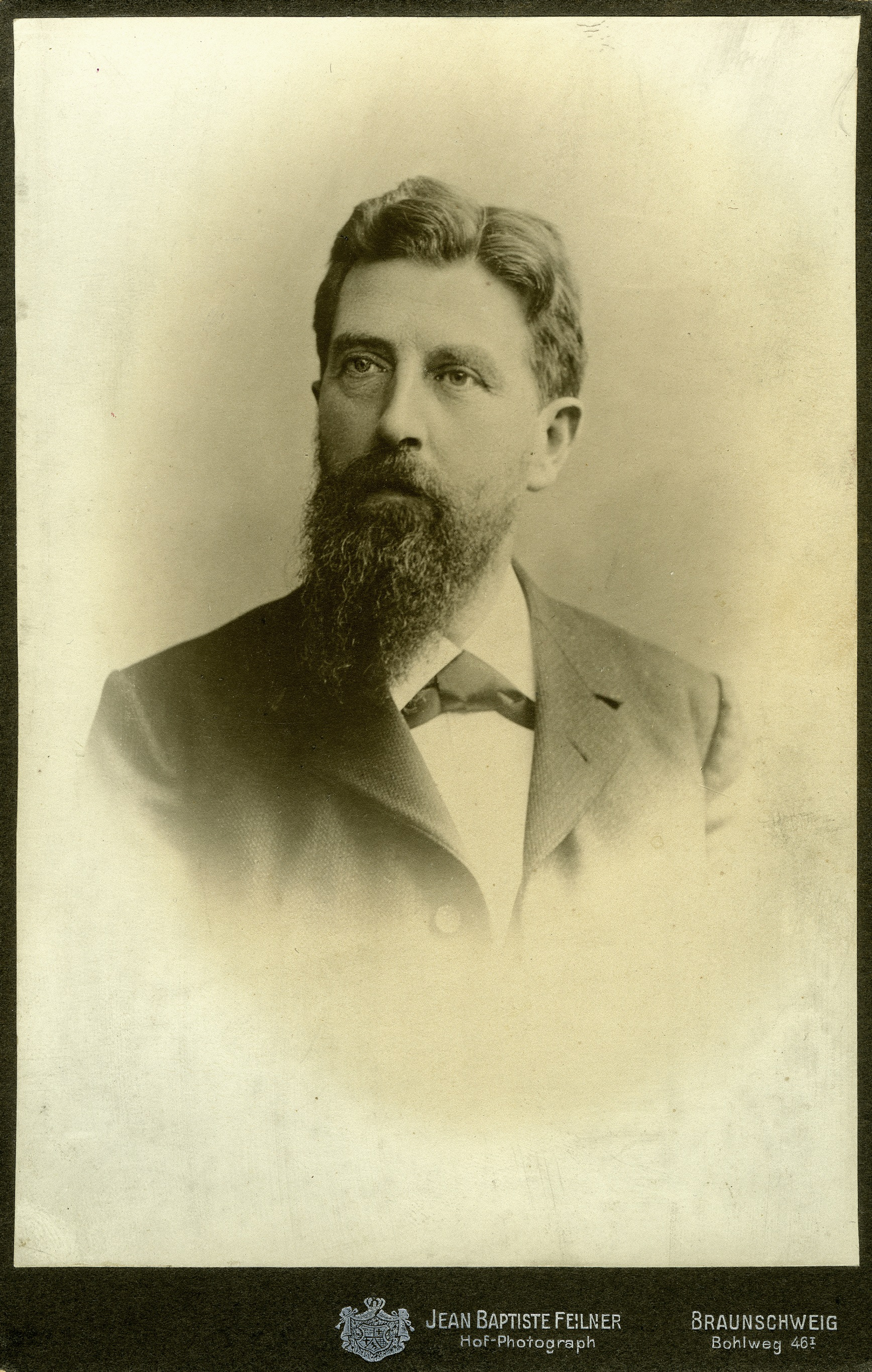 Rechtlicher Hinweis: Die Verwendung der Fotos ist frei für journalistische Zwecke zur Berichterstattung über Braunschweig bei Nennung der Quelle. Bitte schicken Sie ein Belegexemplar an: Braunschweig Stadtmarketing GmbH Schild 4 38100 Braunschweig . Original-Begleittext: "Porträt von Konrad Koch (Archiv Kurt Hoffmeister / Jean Baptiste Feilner) Der Lehrer Konrad Koch (1846-1911) erreichte 1872 die Einführung von Schulspielen an seiner Schule, dem Braunschweiger Martino-Katharineum. Der 1874 eingeführte Fußball war von ihm zunächst als ergänzendes Spiel für den Winter gedacht. In modernen Spielen sah Konrad Koch nicht nur eine hervorragende Möglichkeit zur Motivation seiner Schüler, vielmehr glaubte er an ihren pädagogischen Wert für die Vermittlung körperlicher Konstitution und sozialer Kompetenzen."